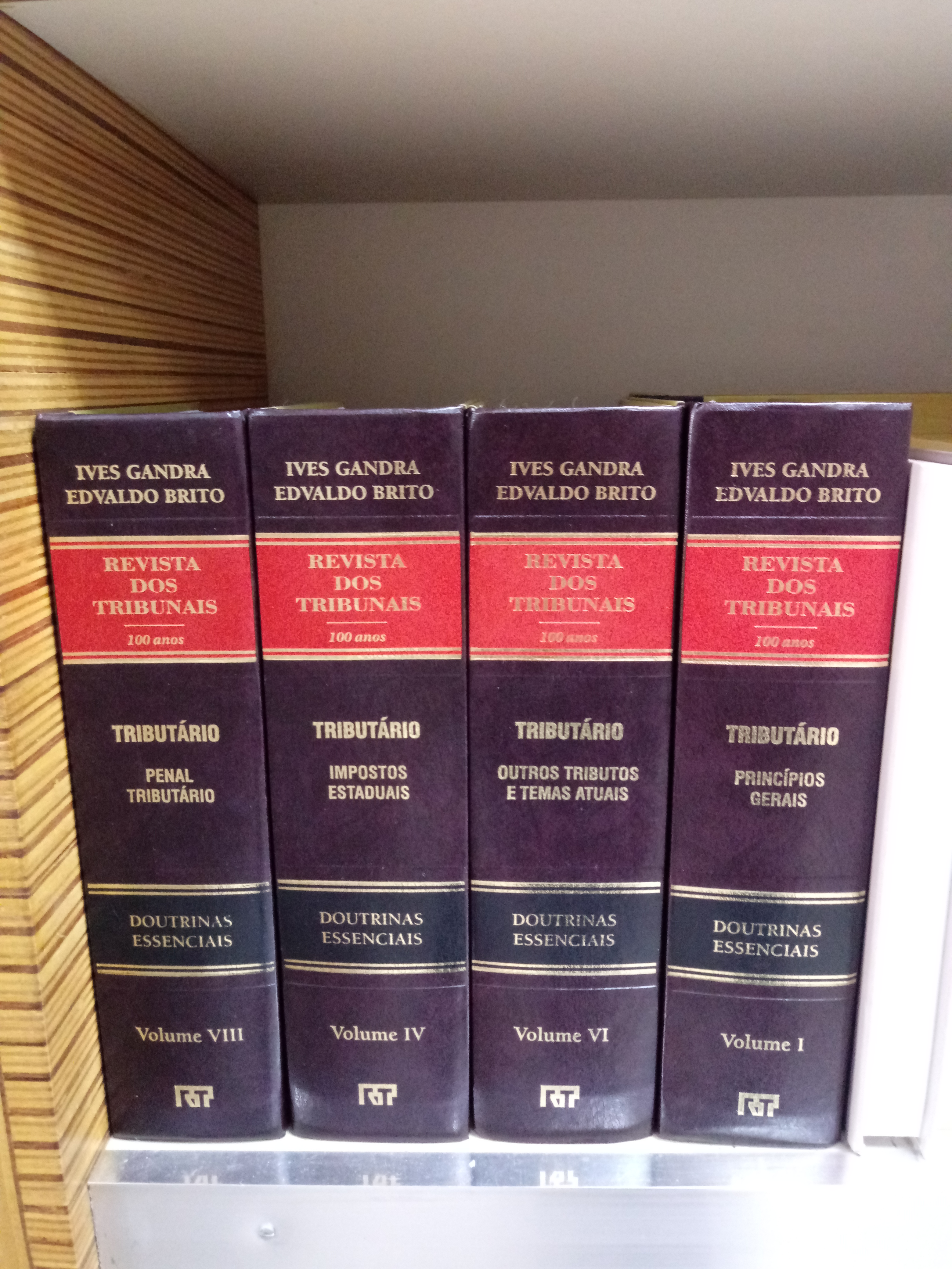 Revista dos Tribunais numa libraria do Riversite Shoppins em Teresina.